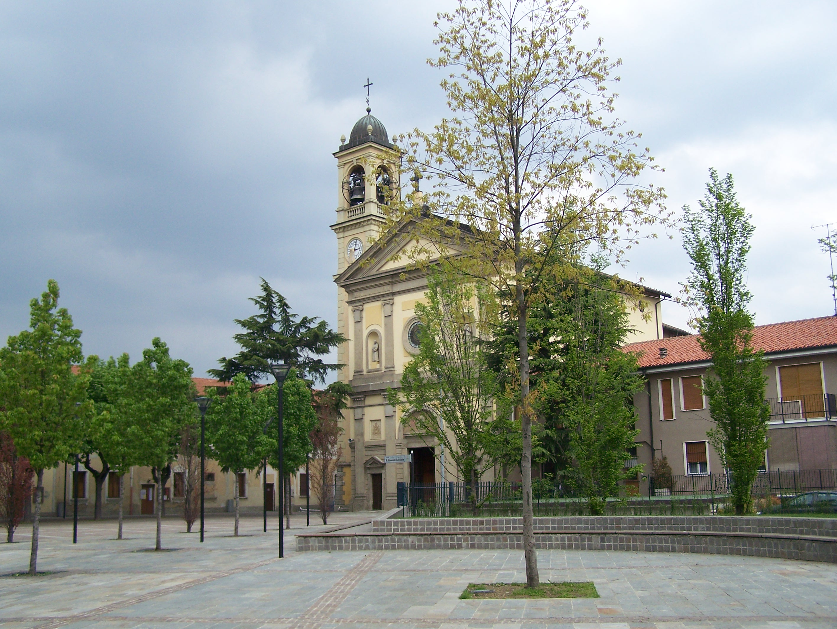 Autore: Utente:KronosDescrizione: panorama della piazza e della facciata della chiesa di san Giovanni Battista di Cesano BosconeFonte: fotografia scattata da fotocamera digitale non professionale